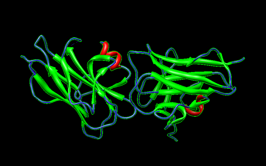 Estructura cristalina del dominio N-Reelin de la proteina F-spondin